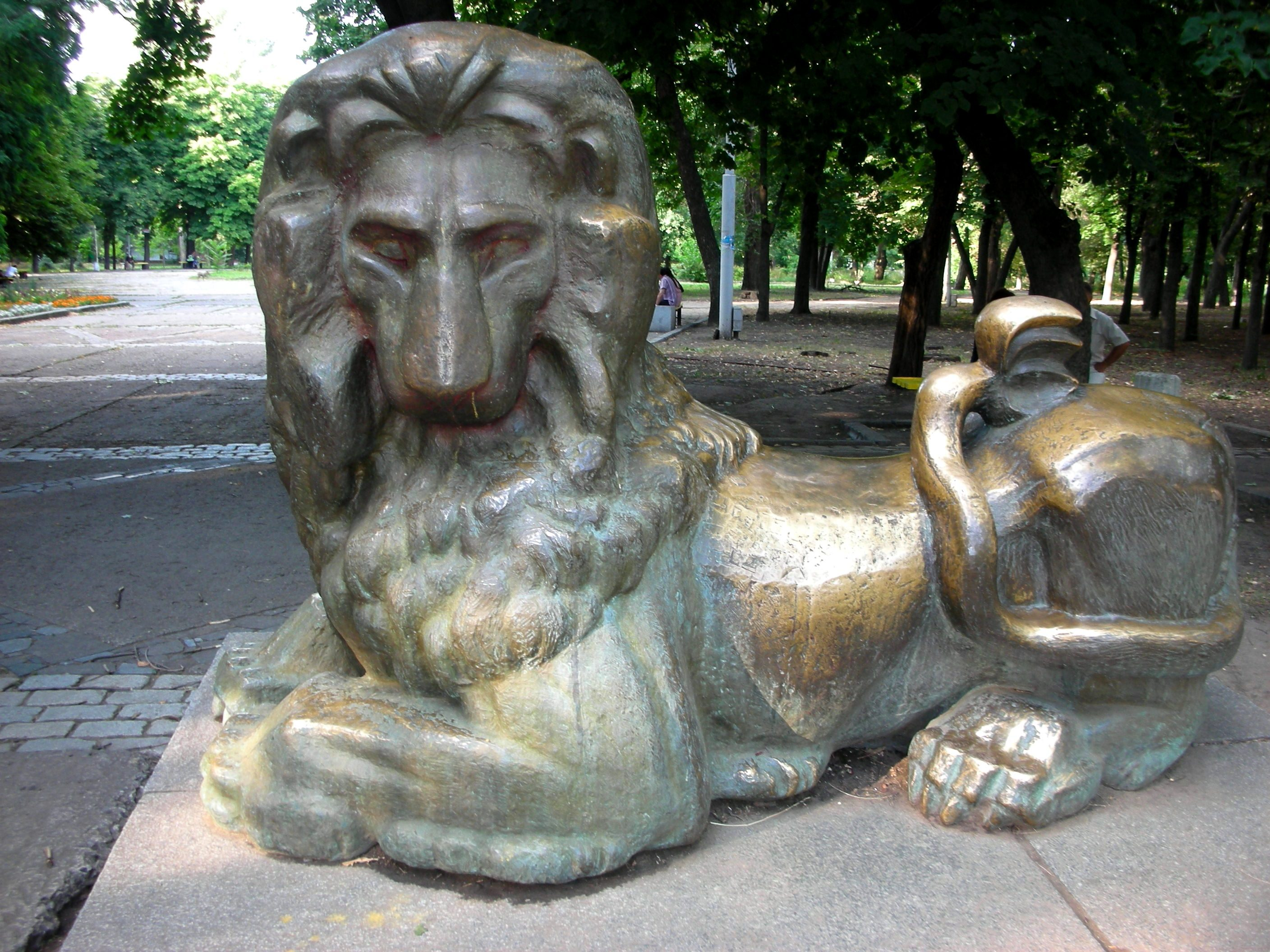 Парк ім. Шевченка, м. Дніпропетровськ пл. ім. Шевченка, 1